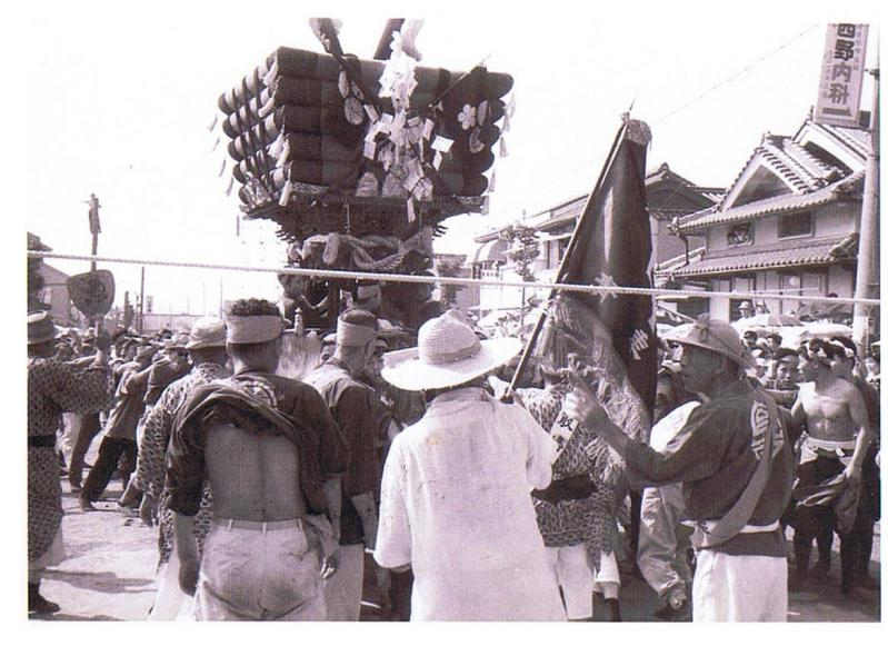 中の町通りでの「かきあい」